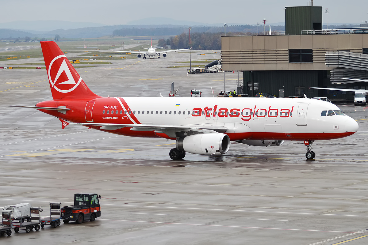 AtlasGlobal Ukraine, UR-AJC, Airbus A320-232